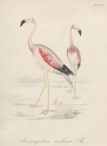 Famenco Chileno descrito por Rodolfo Amando Philippi en 1854